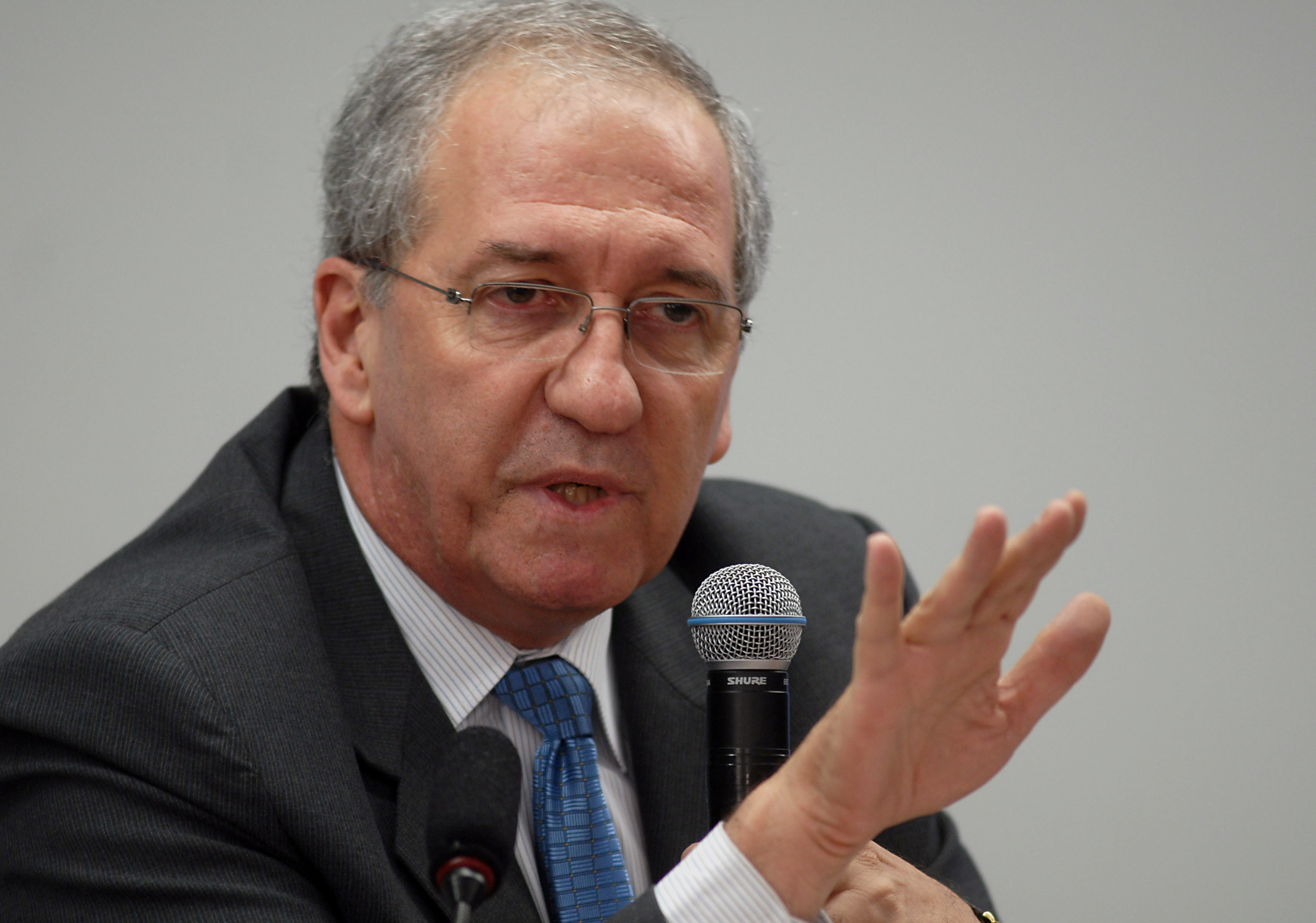 Ministro Franklin Martins